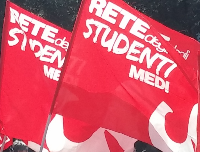 Bandiere della Rete degli Studenti Medi